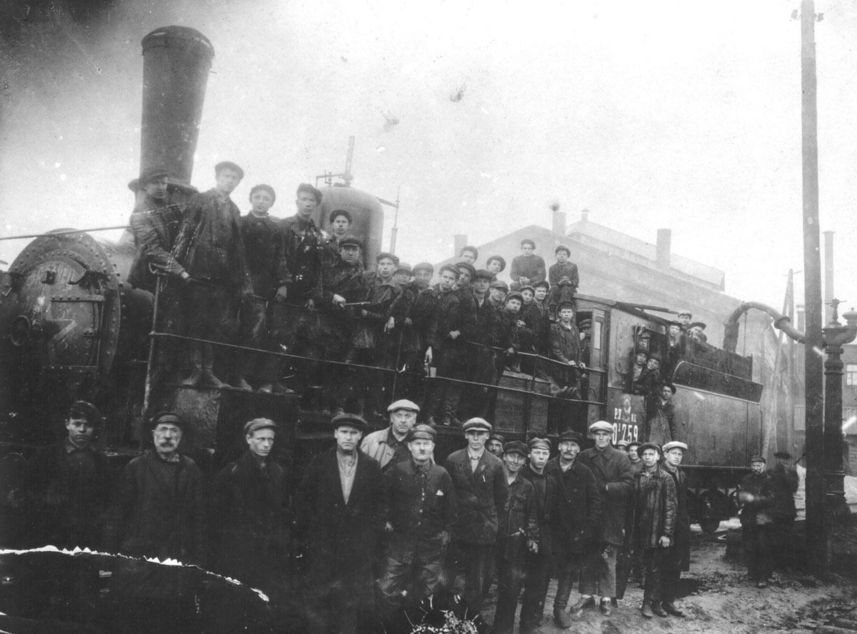 Паровоз Од-759 в депо Аткарск